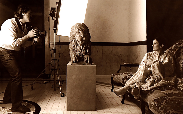 Augusto De Luca fotografa Carla Fracci - 1